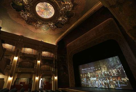 Plafon del teatro